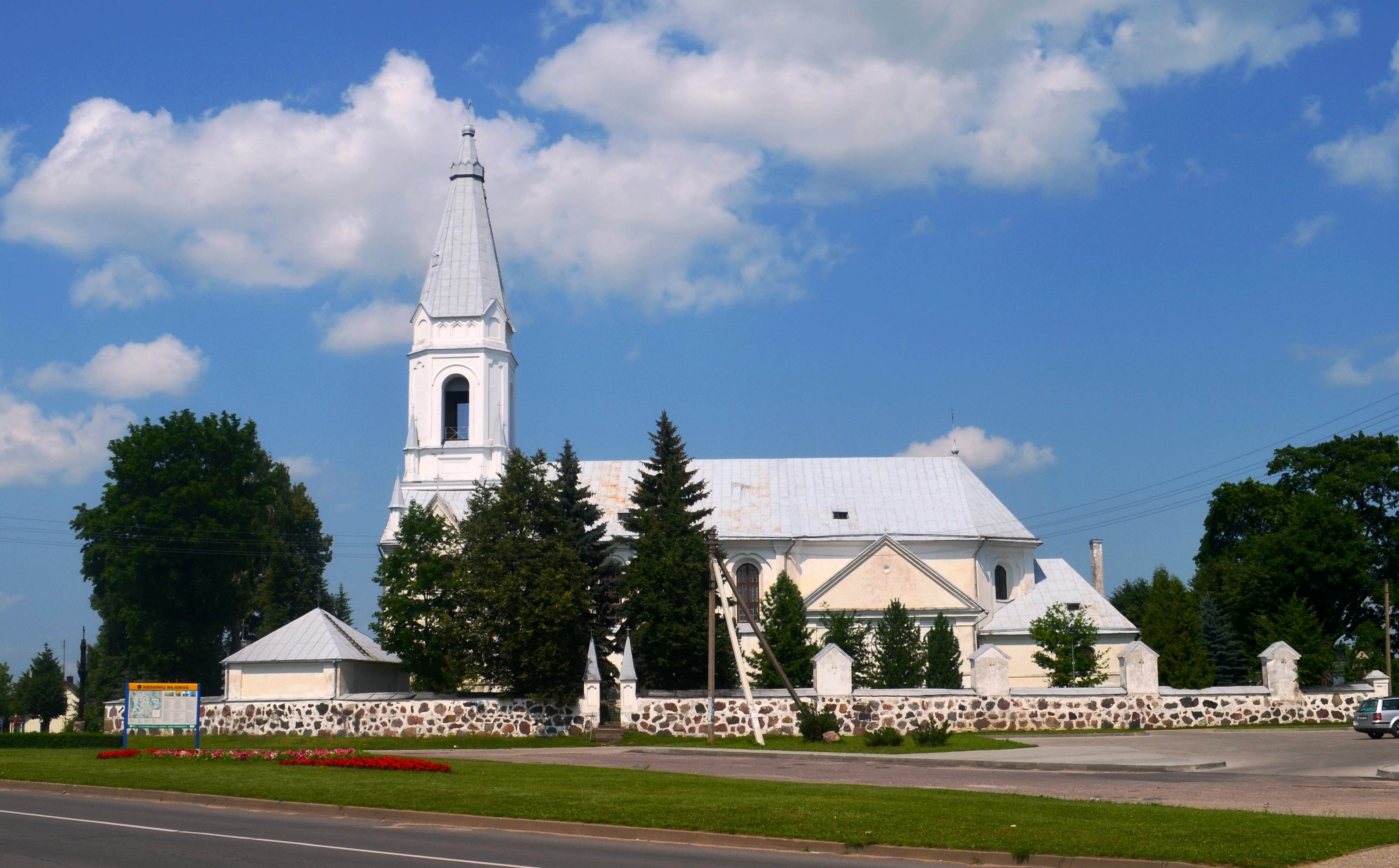 Šėtos bažnyčia, Kėdainių raj.